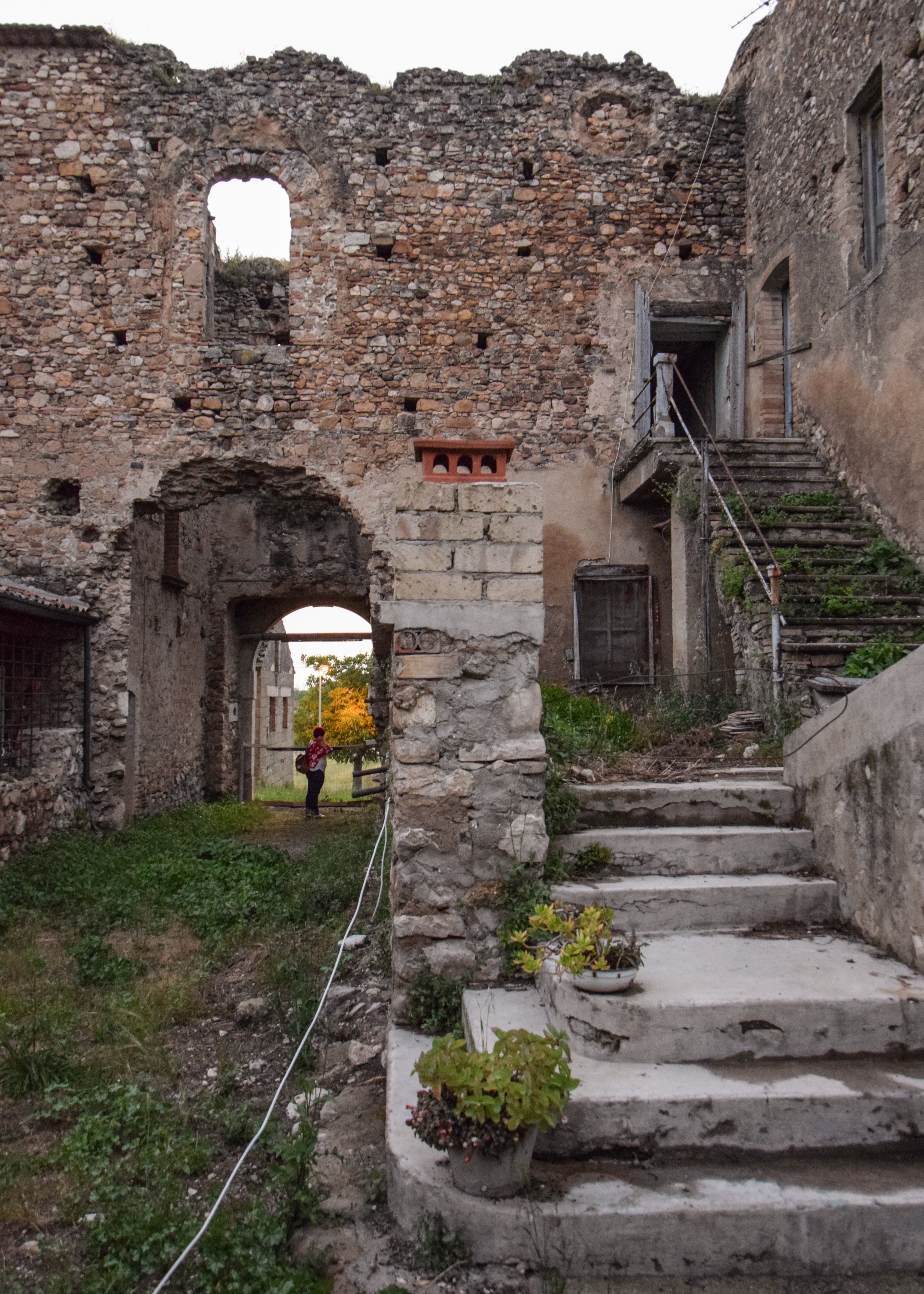 Il Casino del Principe, costruzione voluta da Federico II al Cubante di Calvi (BN)